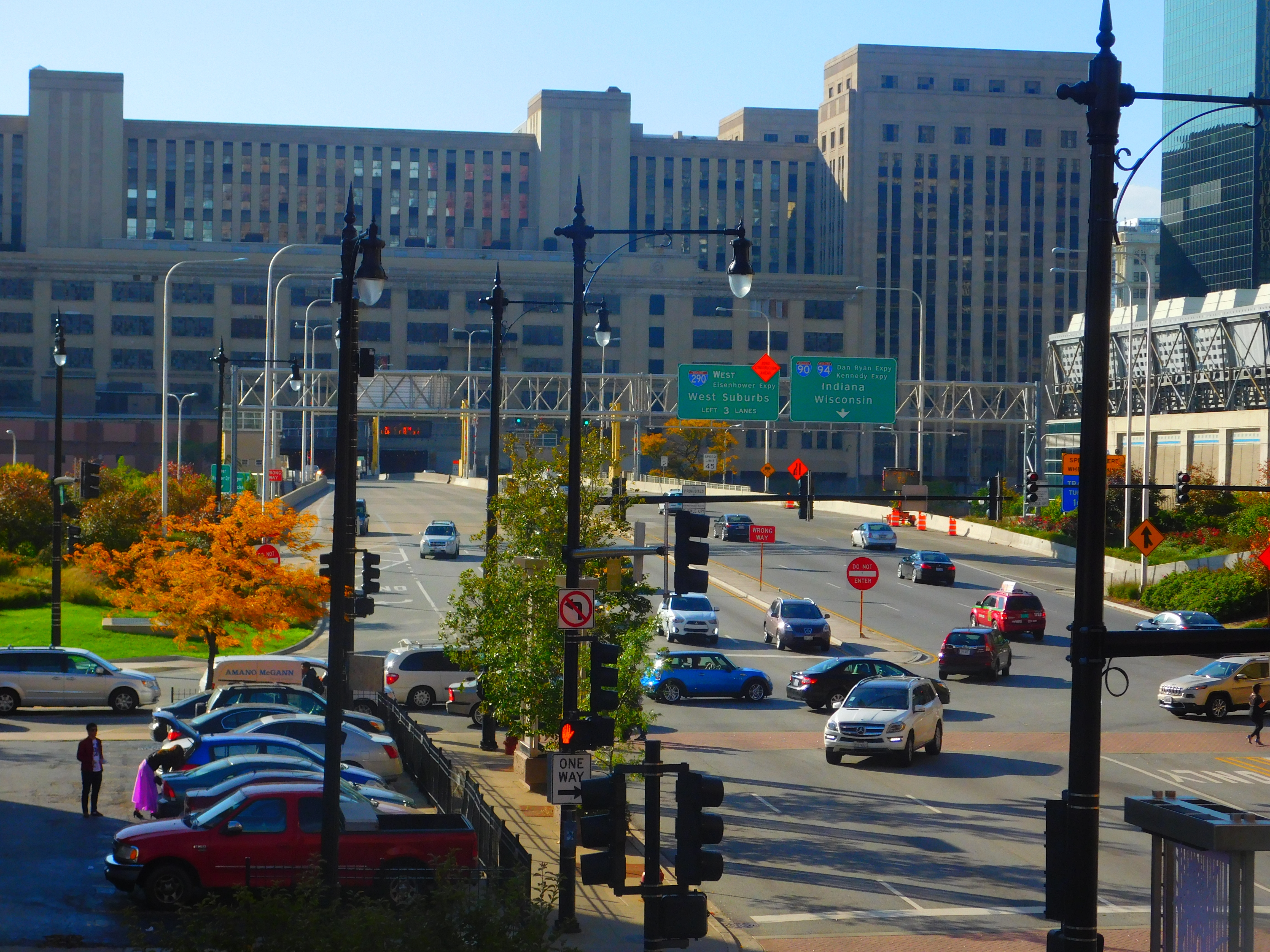 Chicago, Illinois